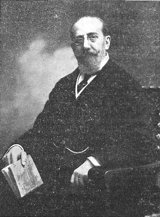 Retrato de Manuel Tolosa Latour, fotografía de Kaulak publicada en la revista española La Ilustración Española y Americana.